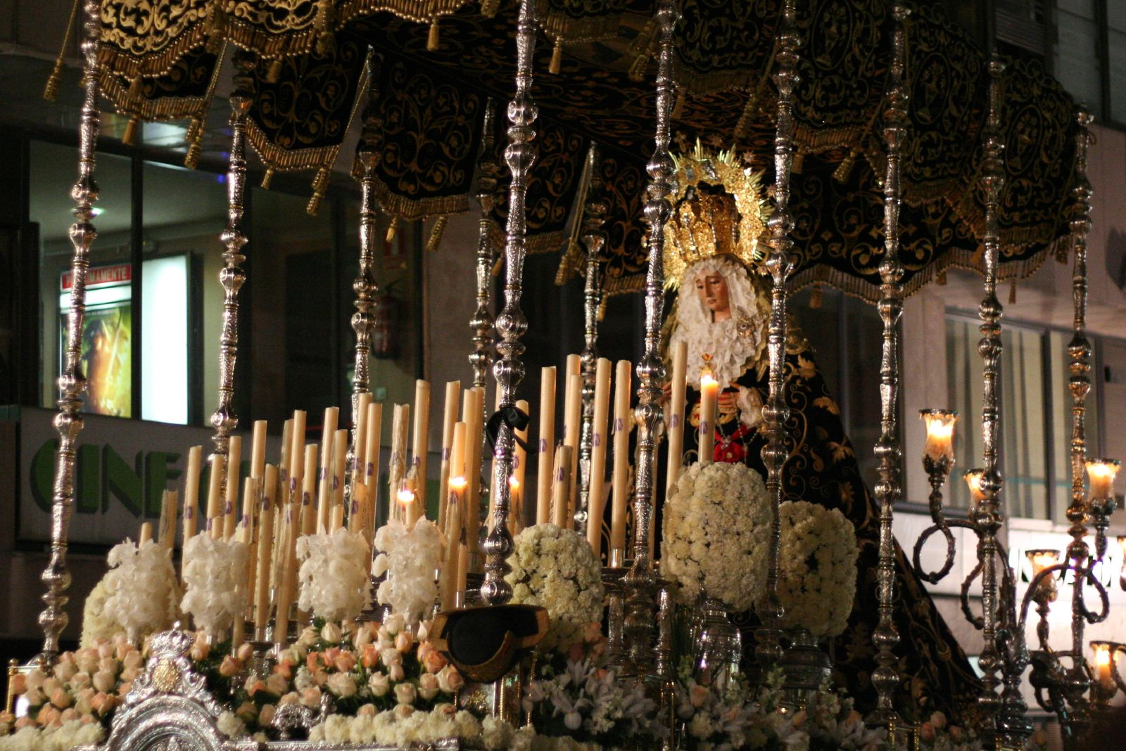 Paso de palio de María Santísima de los Dolores de la Cofradía de la Vera-Cruz de Jaén el Jueves Santo de 2008.